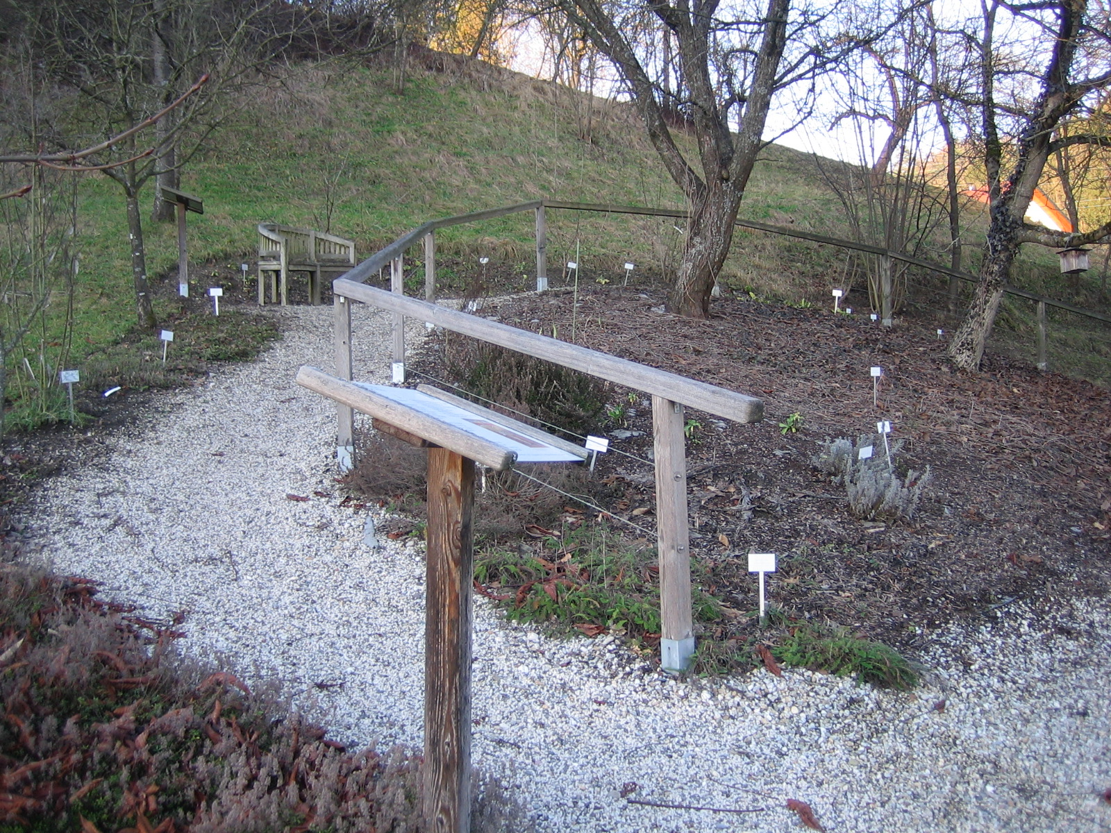 Hildegard von Bingen Weg im Kräutergarten Bad Mühllacken